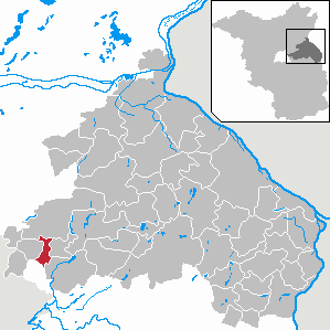 Fredersdorf-Vogelsdorf in Brandenburg (Country) - District Märkisch-Oderland